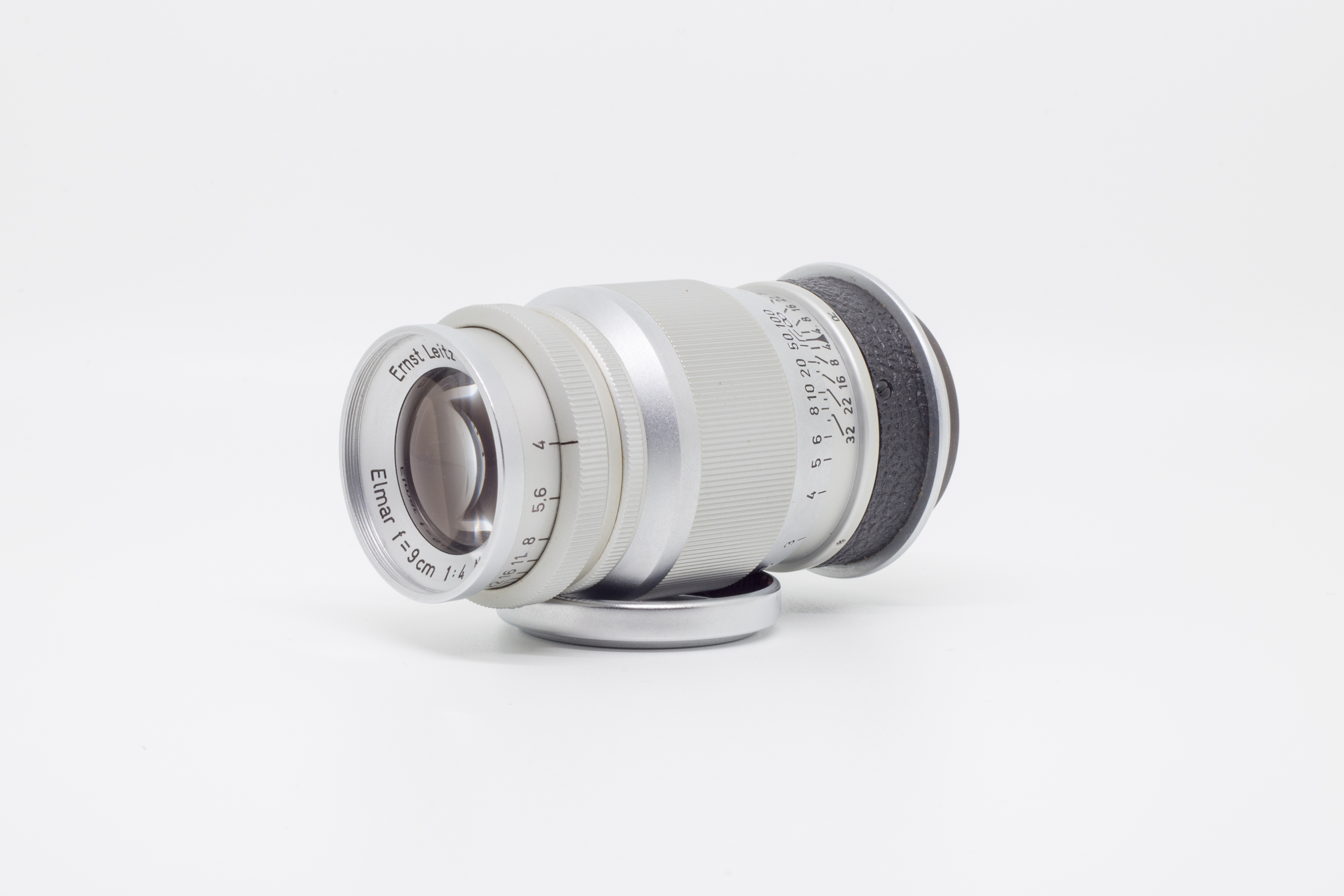 90mm (9cm) screw mount lens for Leica.